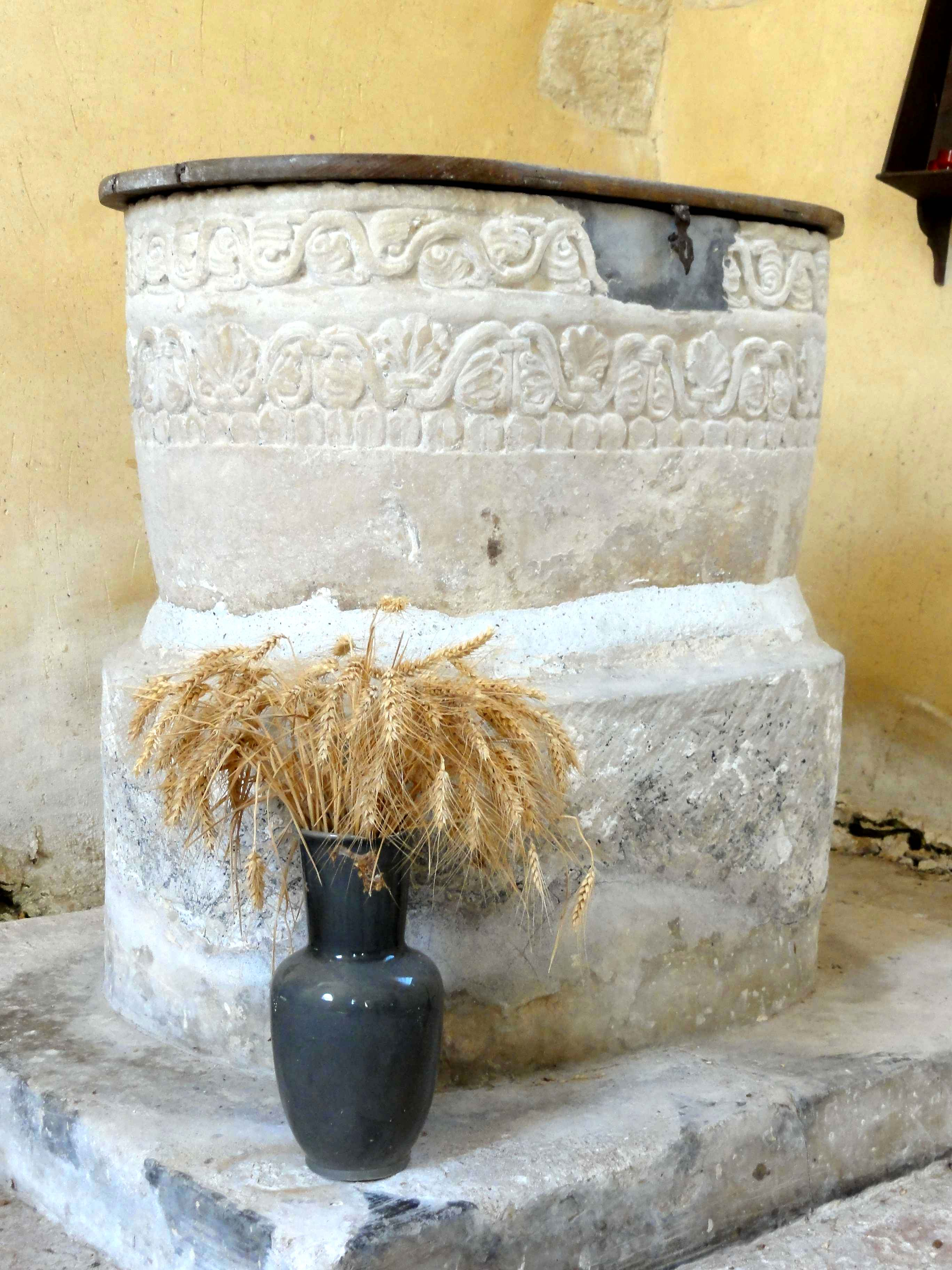 Fonts baptismaux du XIIe siècle.